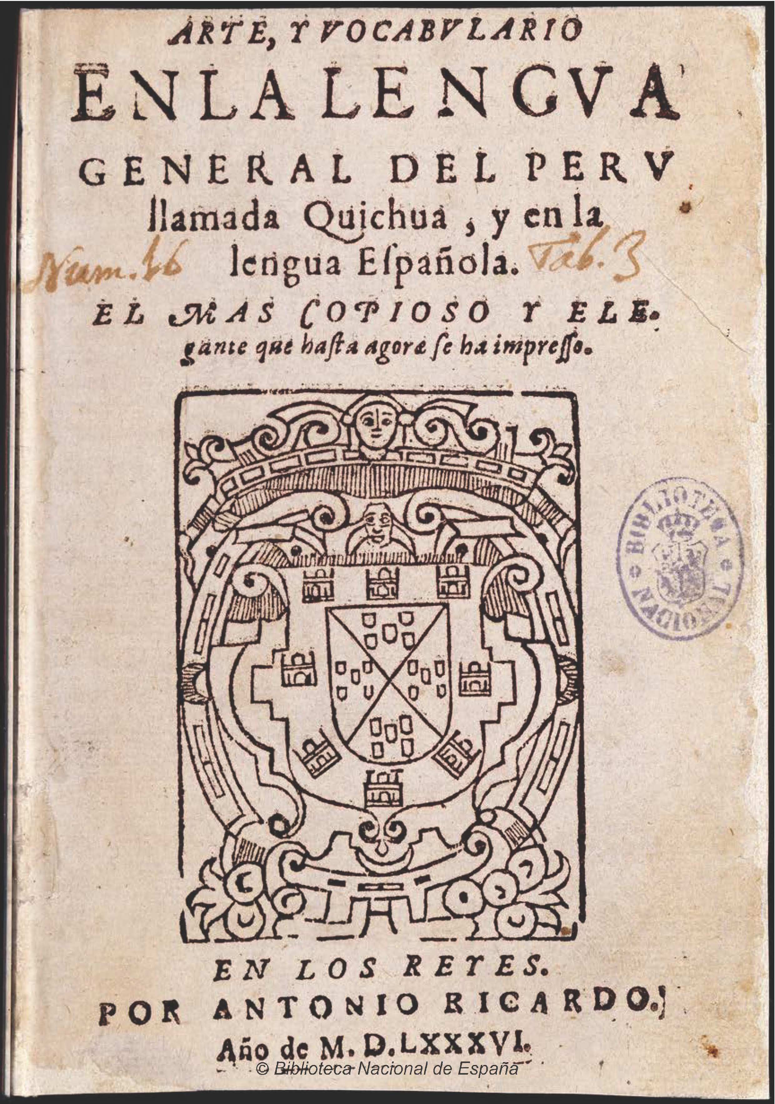 Arte, y vocabulario en la lengua general del Peru llamada Quichua, y en la lengua Española [Texto impreso] : el mas copioso y elegante que hasta agora se ha impresso. - En los Reyes [Lima] : por Antonio Ricardo, 1586. - [184], 40 h.; 8º. Signatura R/9166